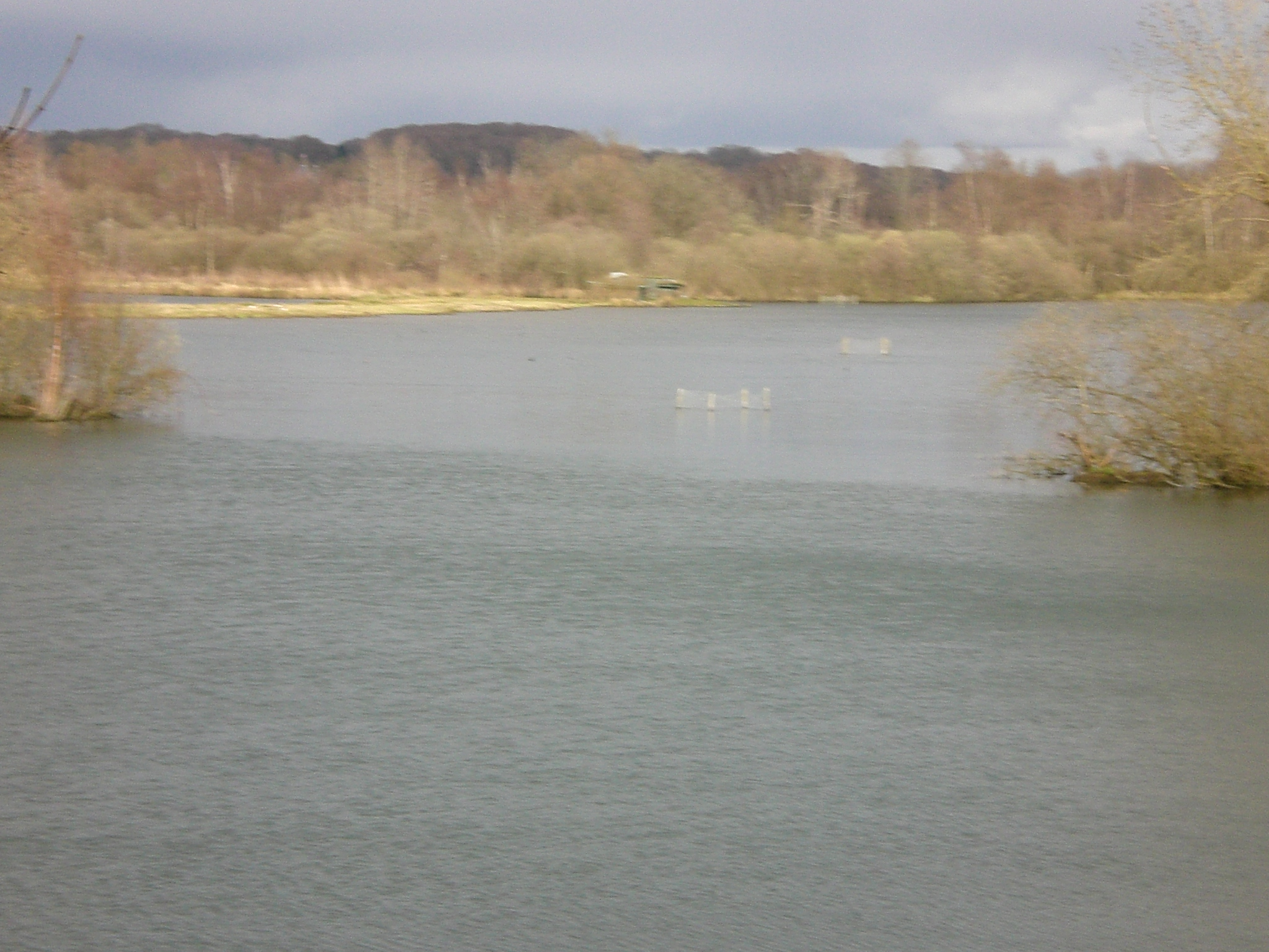 Marais de la Maye à Bernay-en-Ponthieu